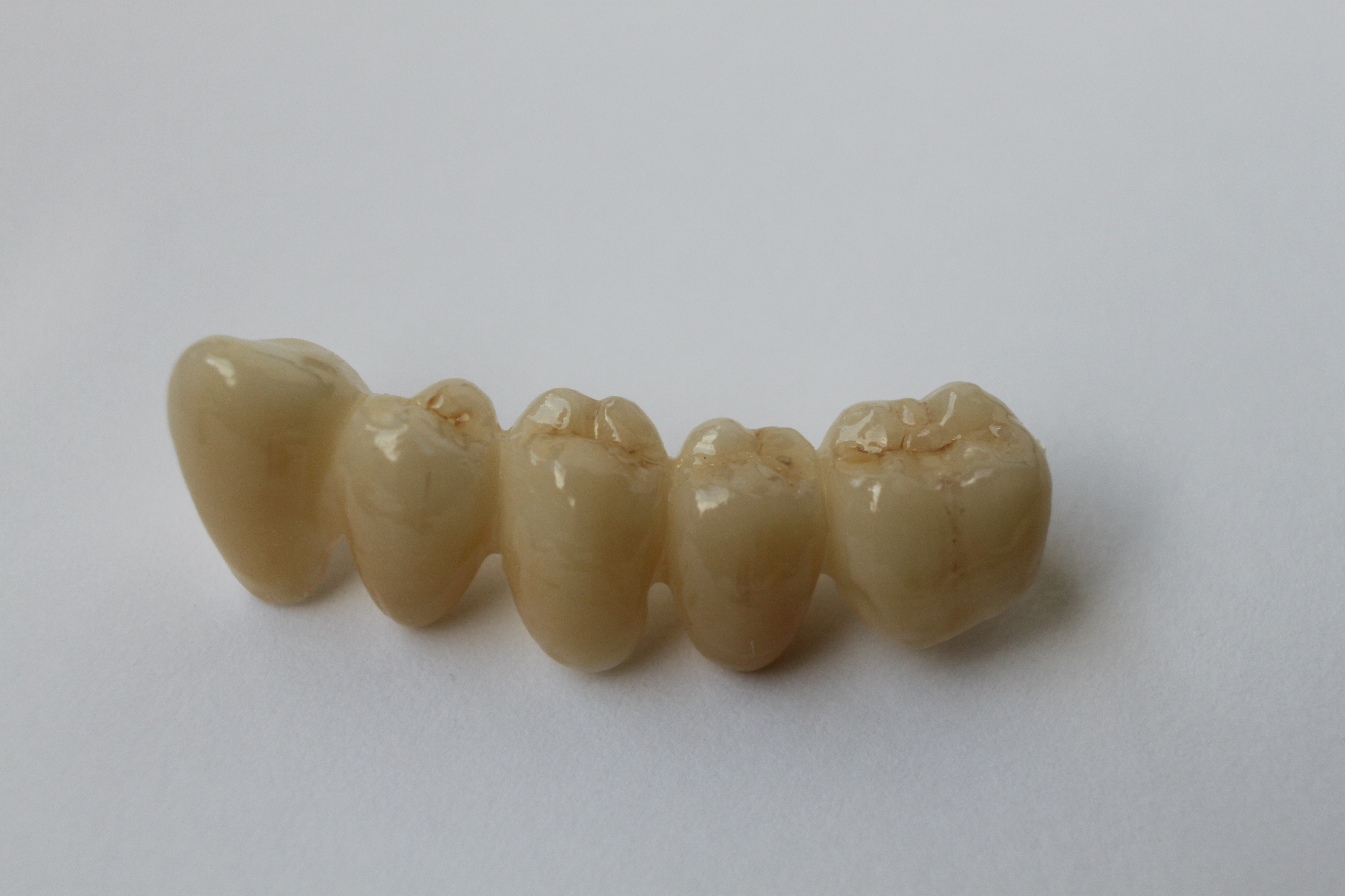 Metallfreie Brücke Zirkoniumdioxid